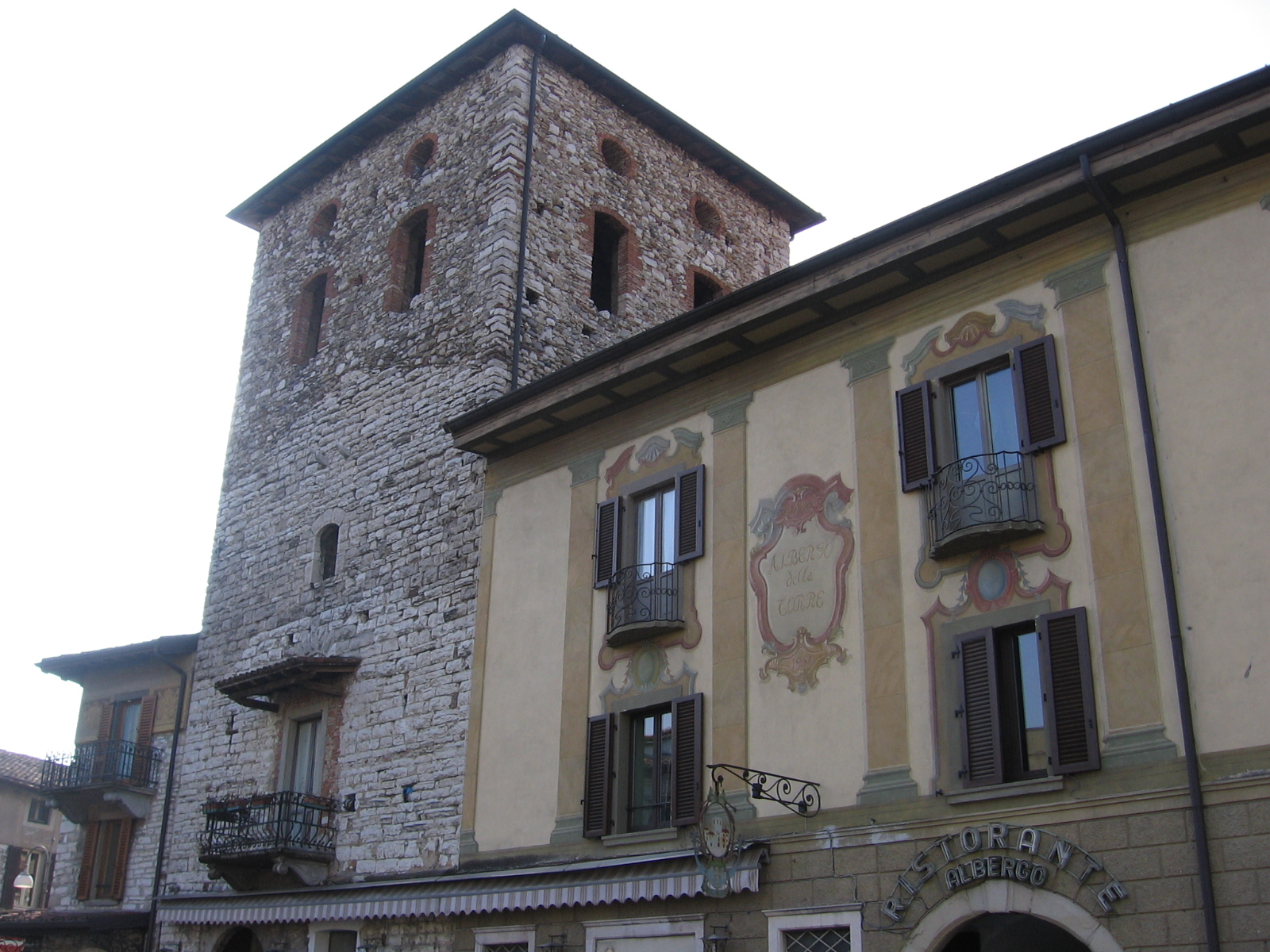 Trescore Balneario, Bergamo, Italia